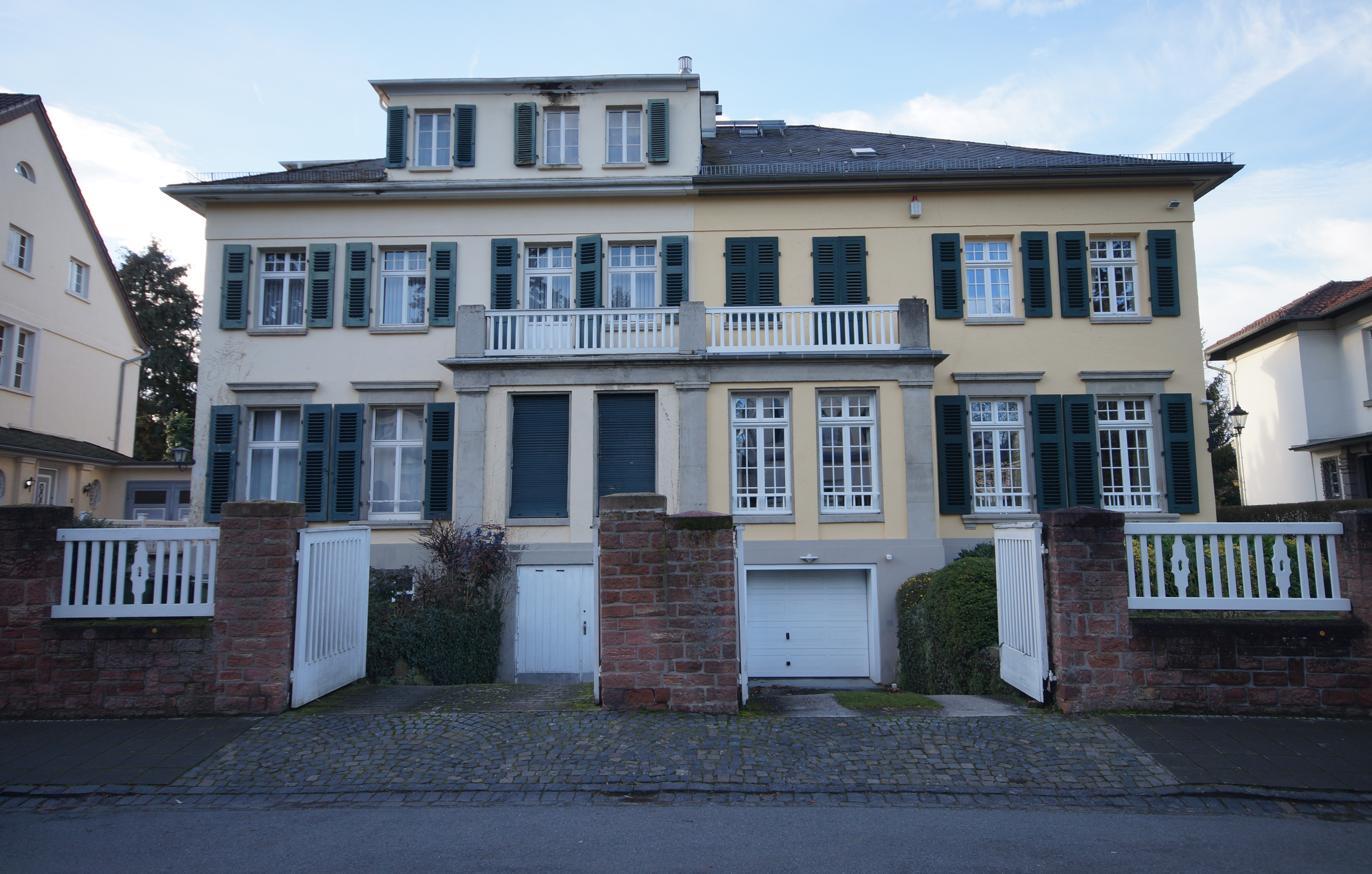 Die Fassade des Doppelhauses Am Klostergarten 9/11 in Mainz-Oberstadt